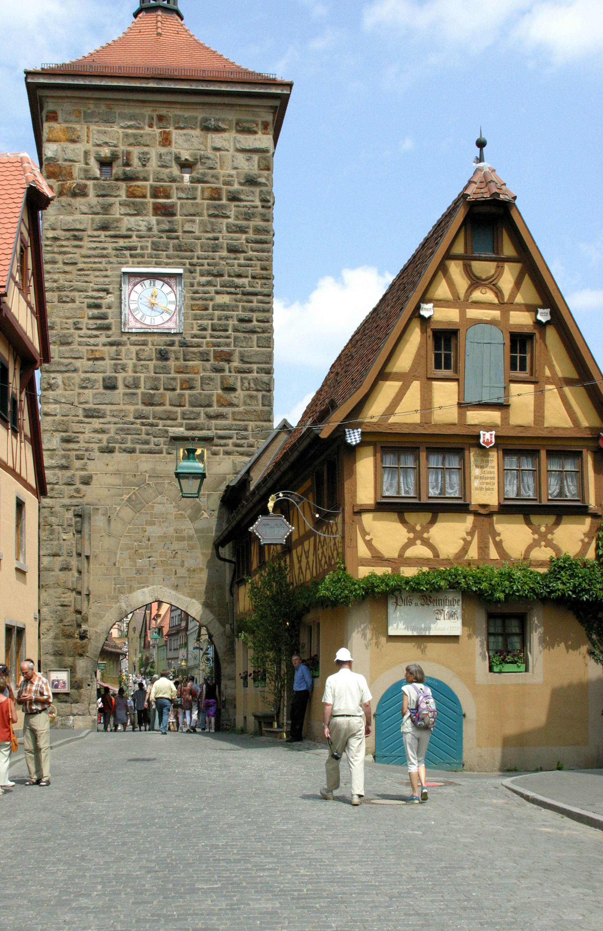 Picture from Rothenburg ob der Tauber